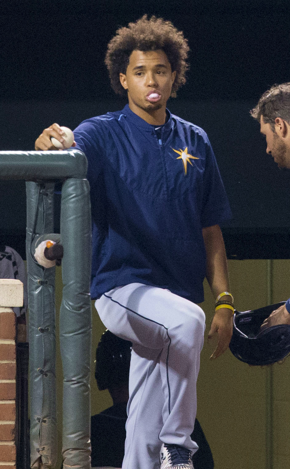 Chris Archer